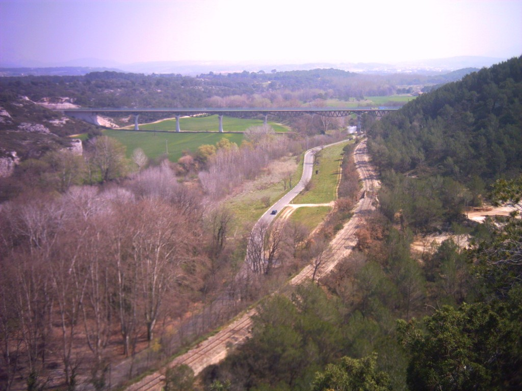 Le viaduc de l'Arc sur la ligne à grande vitesse (LGV) Méditerranée, vu de Roquefavour. Sur la droite, la ligne de Rognac à Aix.